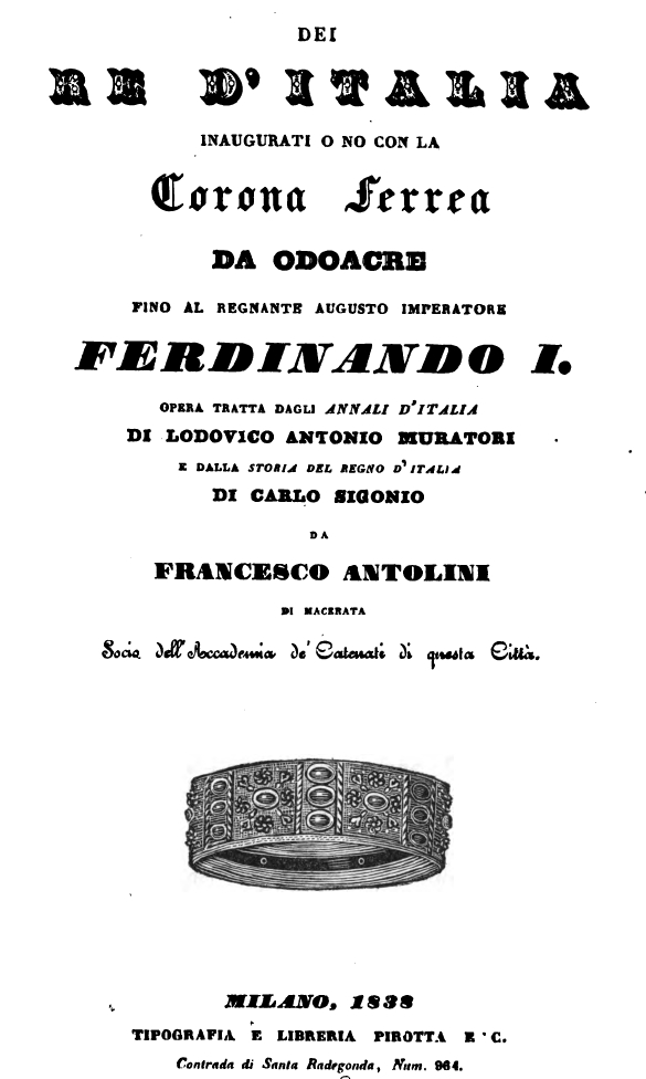 Frontespizio del libro di Antolini sui re incoronati con la corona ferrea scritto per l'incoronamento di Ferdinando I